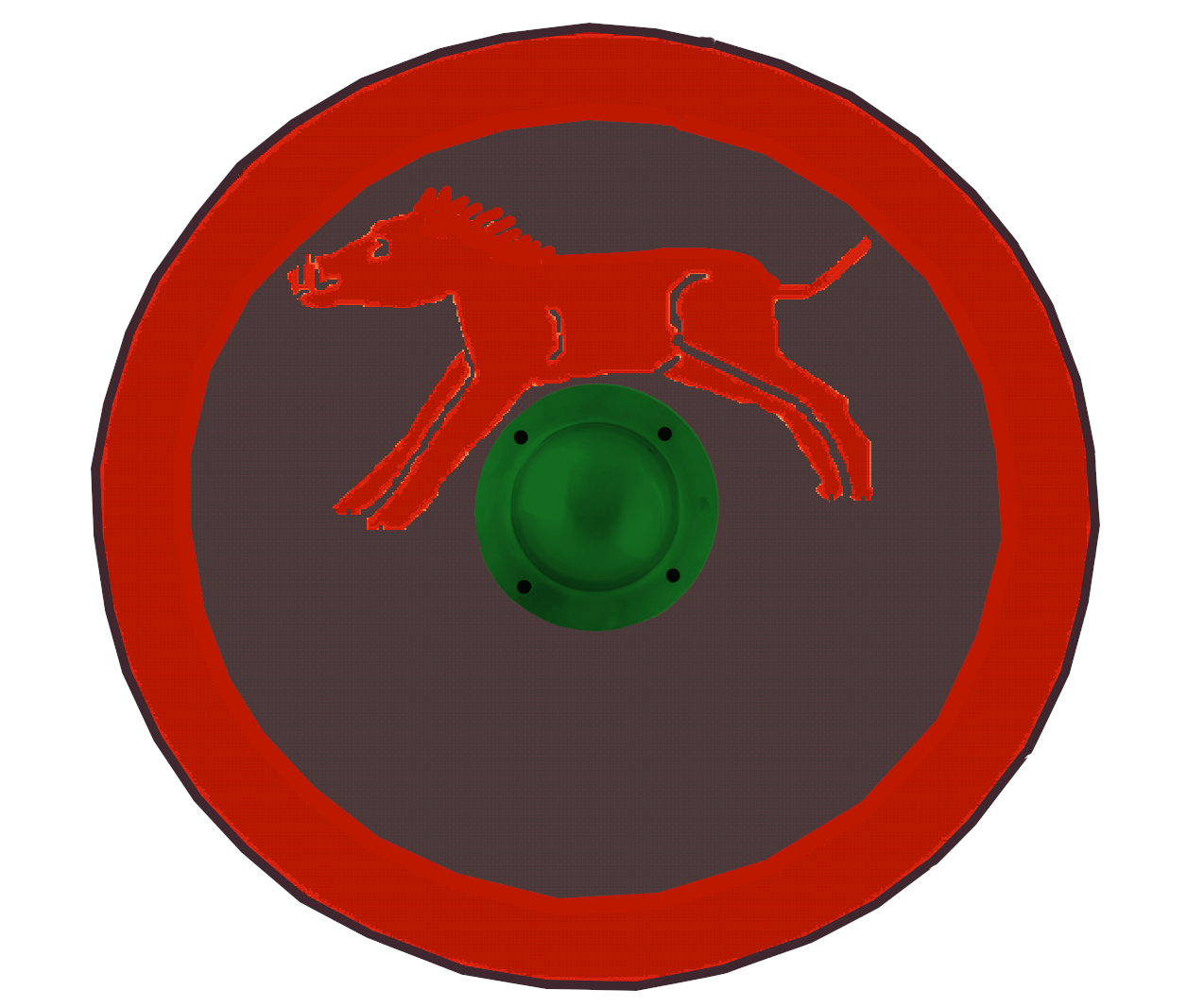 Shield pattern of Prima Flavia Gallicana Constantia in the early 5th century. Source: Notitia Dignitatum Occ. V&VII (Bodlain Library).